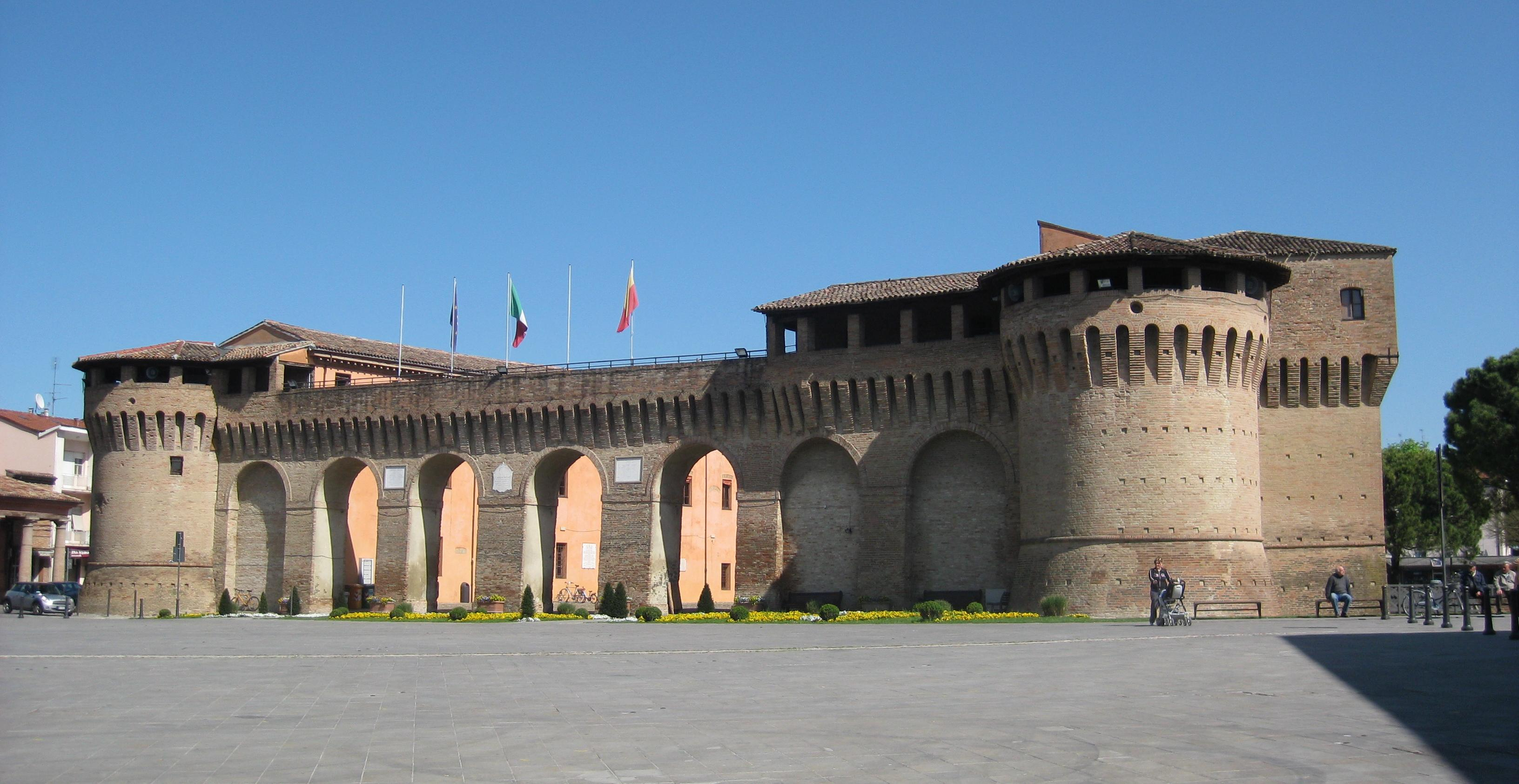 Rocca di Forlimpopoli, vista d'insieme, foto propria